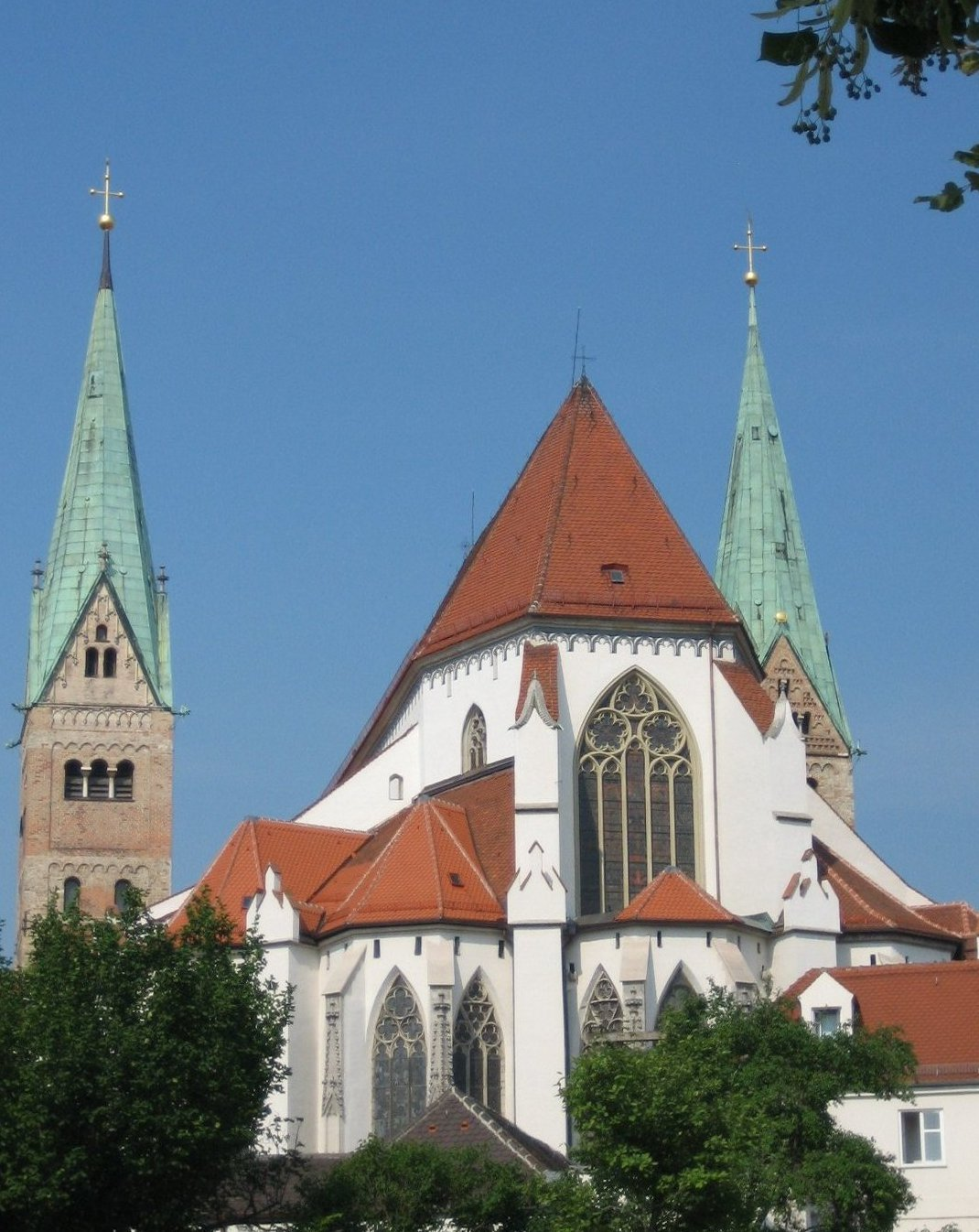 Dom St. Marien in Augsburg, Ostchor, gesehen vom Inneren Pfaffengäßchen aus